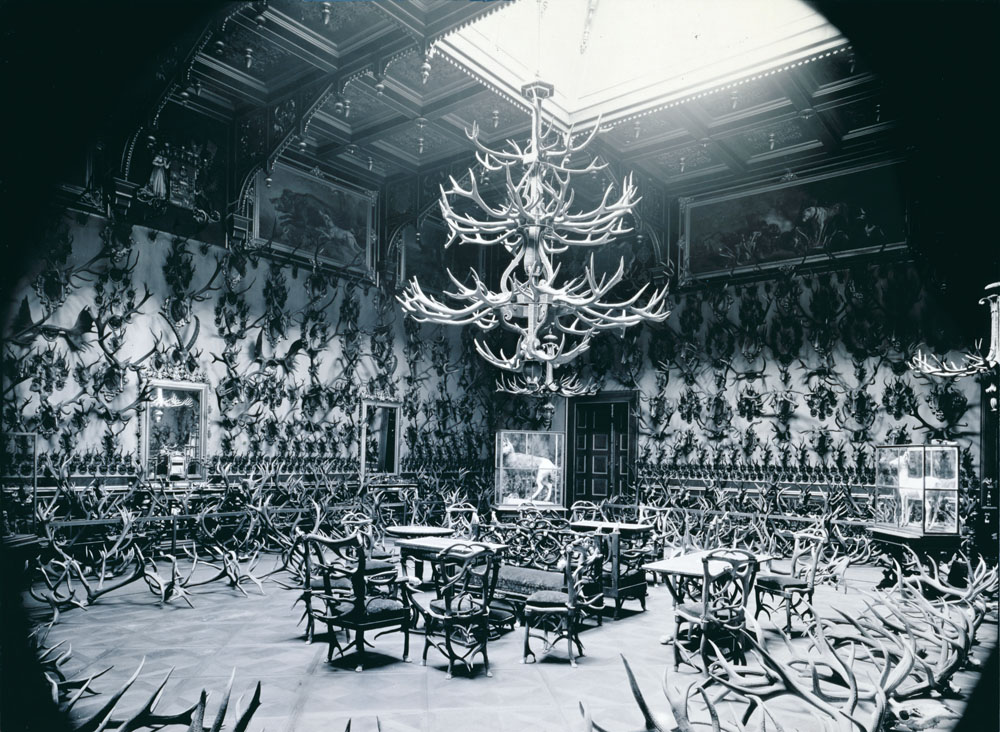 Die Geweihsammlung von Maximilian "Max" Bernhard Graf von Arco-Zinneberg (1811-1885, auch "Adlergraf" genannt) zum Verkauf stand (sog. Sammlung Arco) bildete den umfangreichsten Grundstock für das spätere Deutsche Jagdmuseum. Zur Sammlung Arco, die im Palais der Familie Arco-Zinneberg am Wittelsbacherplatz in München aufbewahrt wurde, gehörten u. a. aus Geweihen gefertigte Möbel. Die Sammlung konnte 1934 für das geplante Museum angekauft werden.